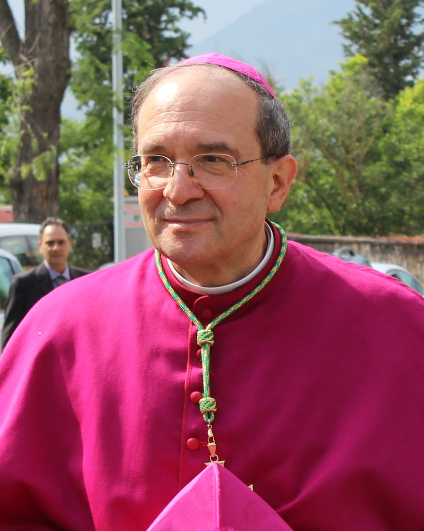 Giuseppe Petrocchi, arcivescovo metropolita de L'Aquila